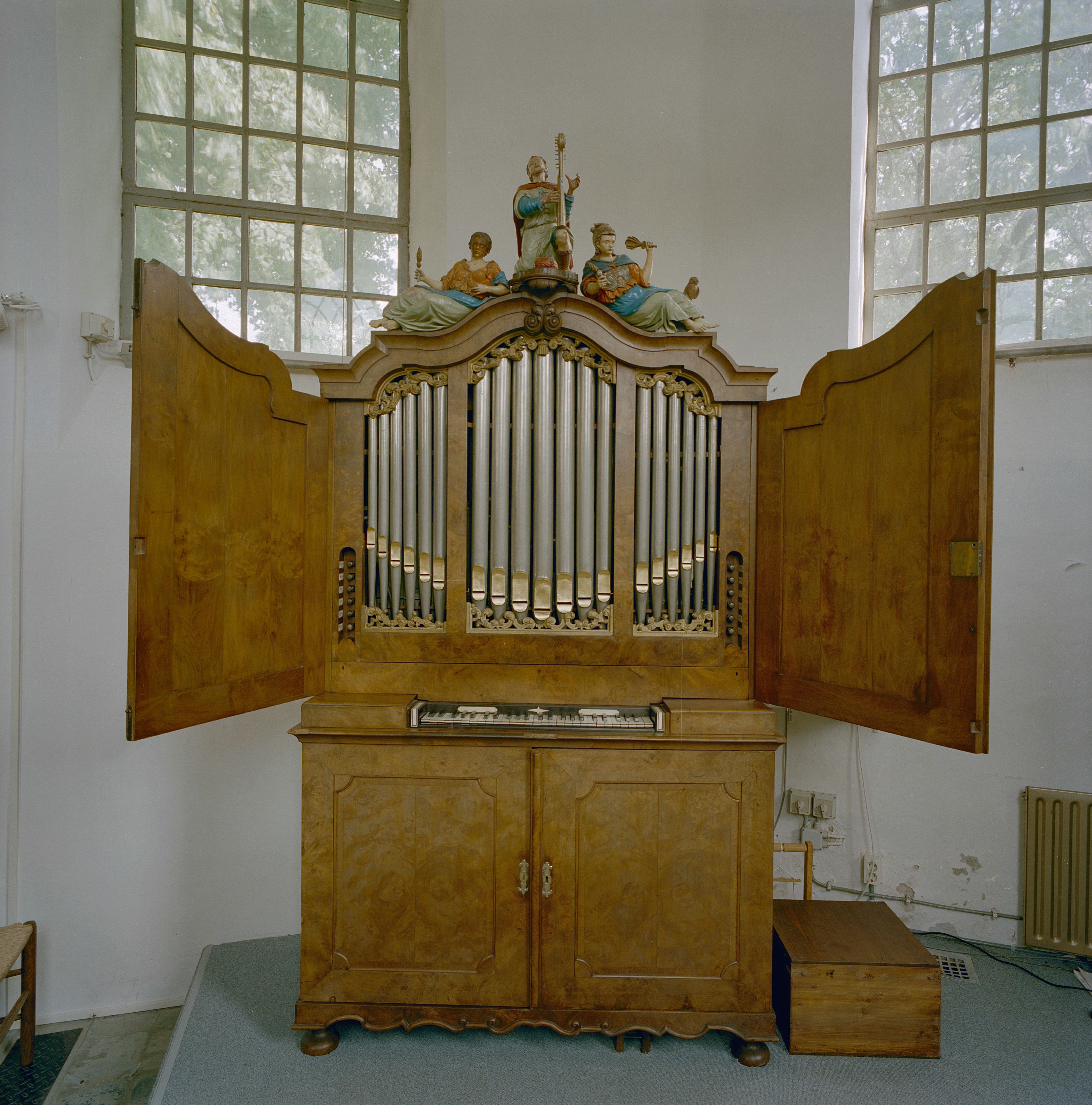 Nederlands Hervormde Kerk: Interieur, aanzicht kabinetorgel, orgelnummer 829 (opmerking: Gefotografeerd voor Het Historische Orgel in Nederland 1726-1769)